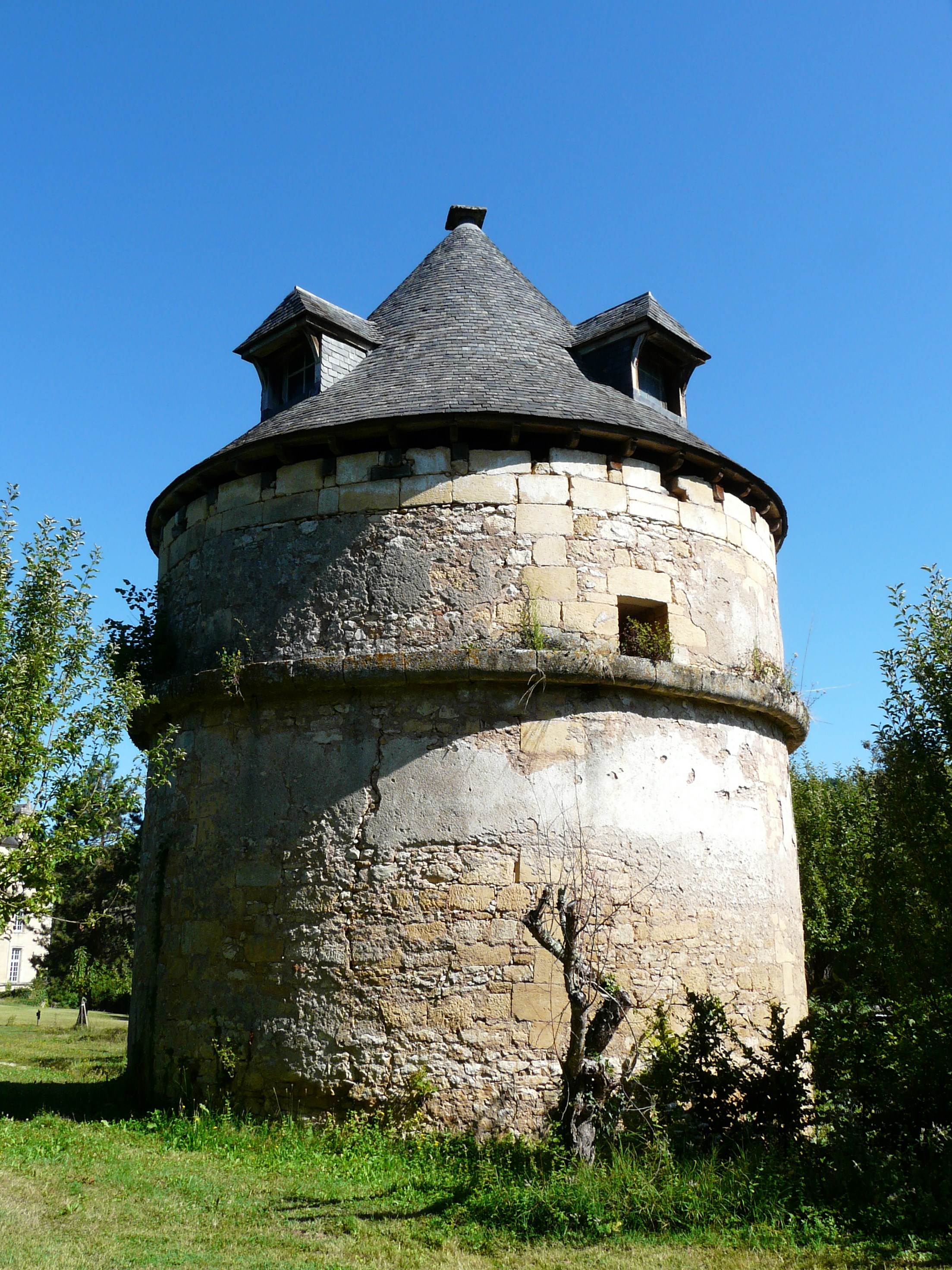 Le pigeonnier du château de Sauvebœuf, Aubas, Dordogne, France Object location45° 05′ 38.6″ N, 1° 11′ 58.8″ E